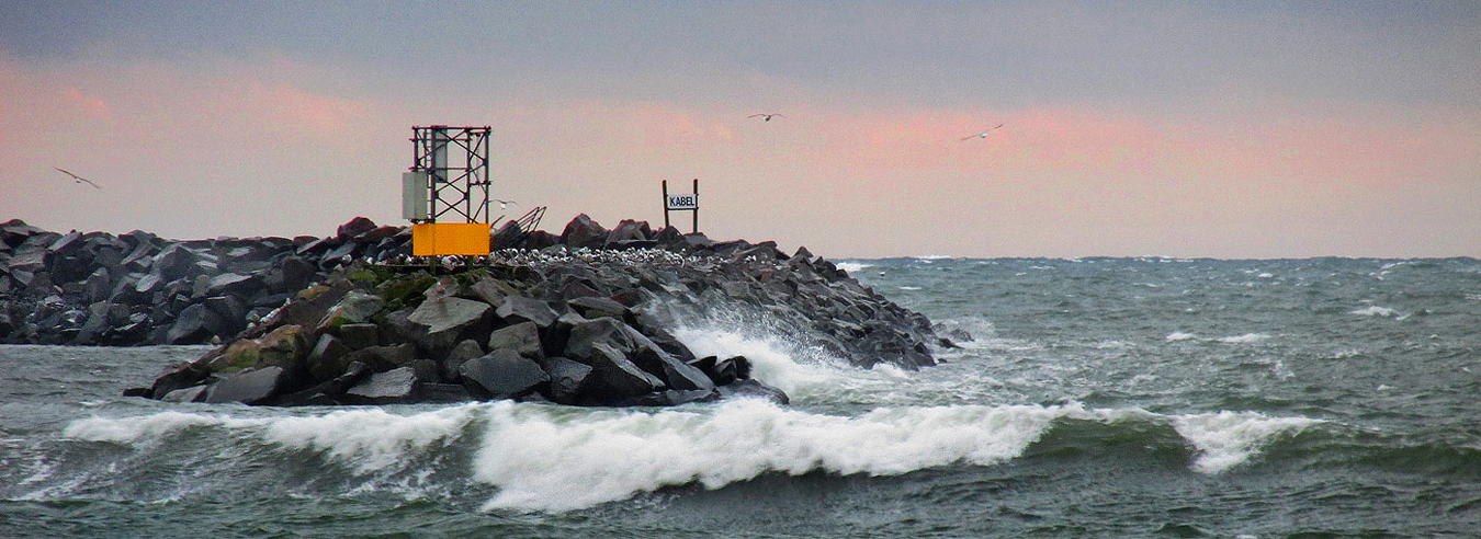 Västra vågbrytaren. Ystads hamn 2015.